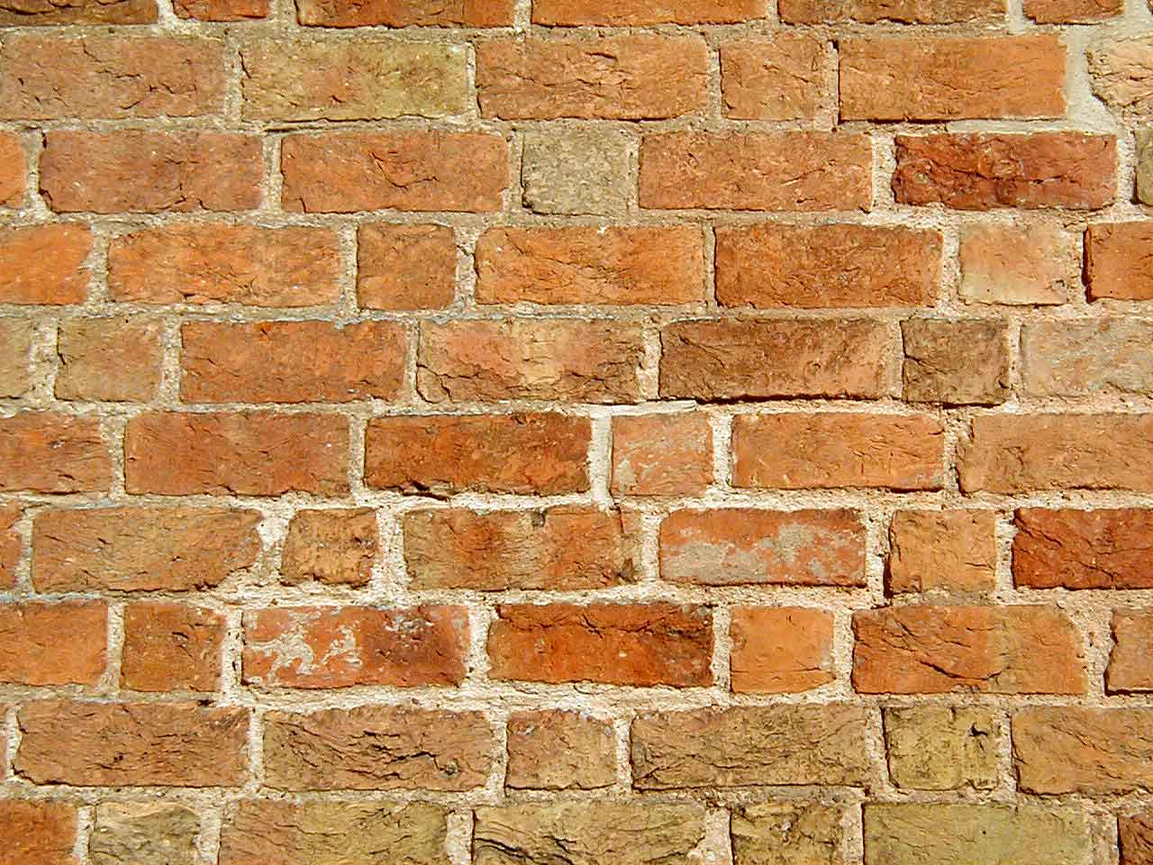 Autor: Ralf Roletschek Marcela GNU-FDL (selbst aufgenommen) ja:??:Ziegelmauer.jpg